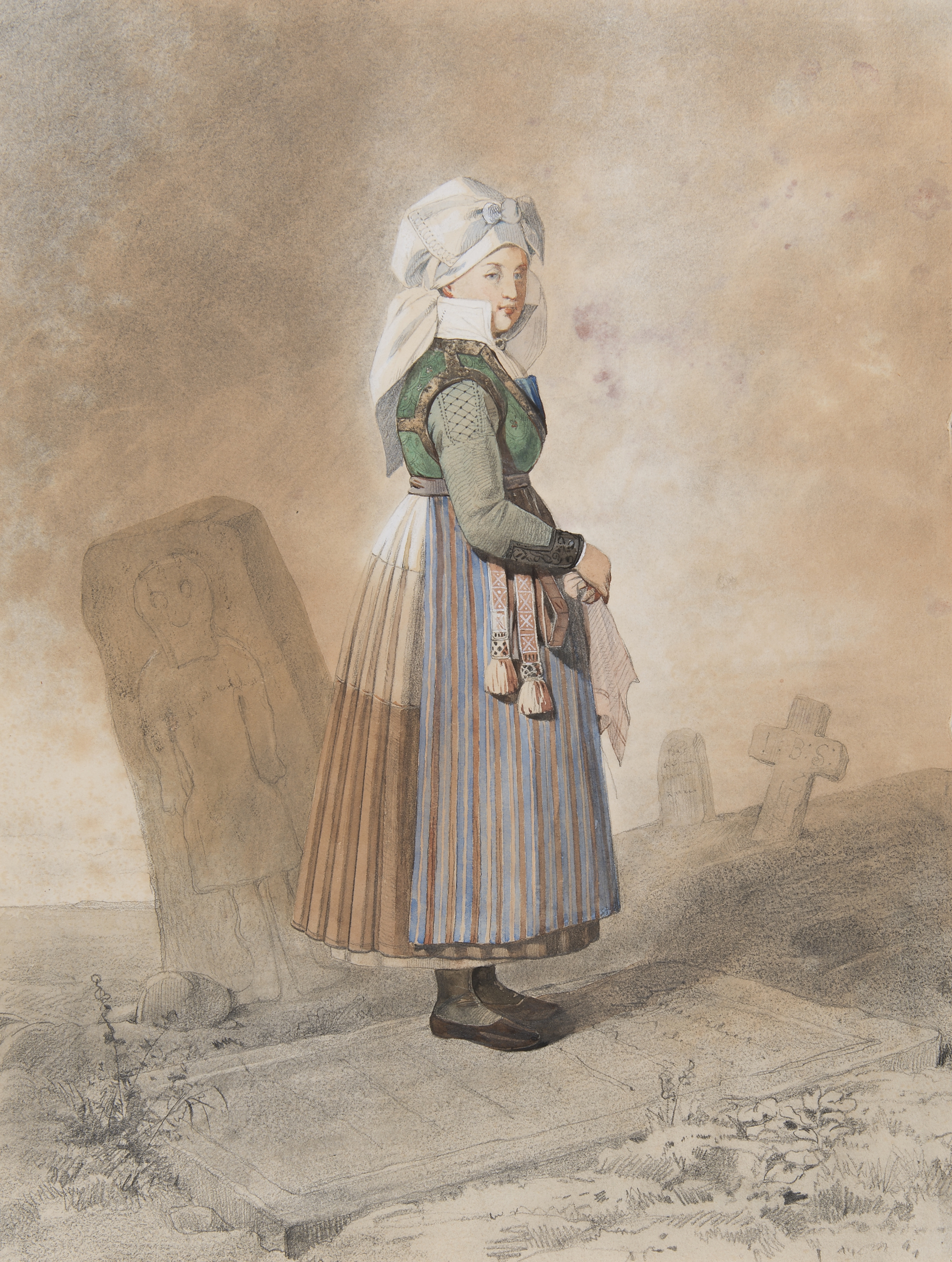 Kvinna i dräkt på kyrkogård, 1800-talets första hälft. Akvarell i storformat av Otto Wallgren Depicted place: Q3591553 (Q3591553) (Härad), Scania (Q180756)